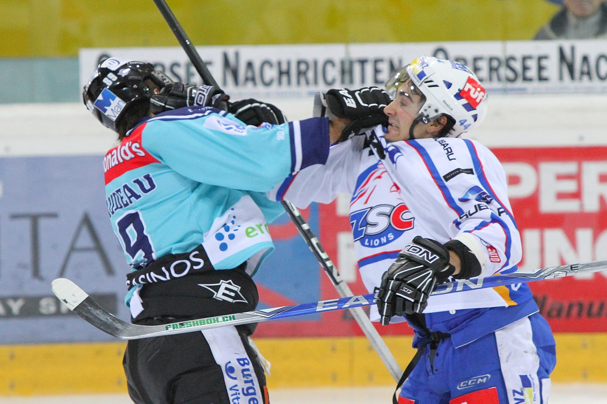 Combat entre Nicolas Thibaudeau et Andres Ambühl lors d'un match entre les Rapperswil-Jona Lakers et le Zürcher Schlittschuh Club Lions, 16 octobre 2010